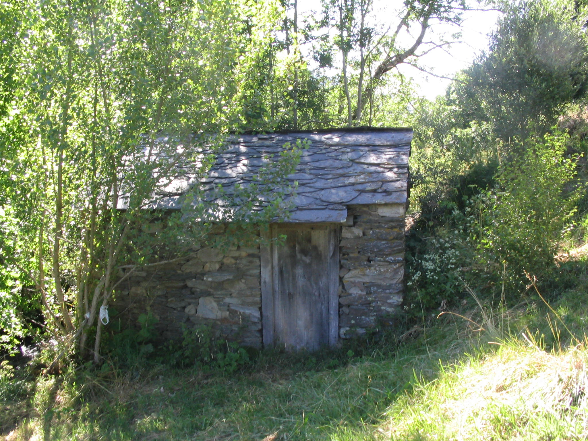 Vegapujín, León, España. Molino.